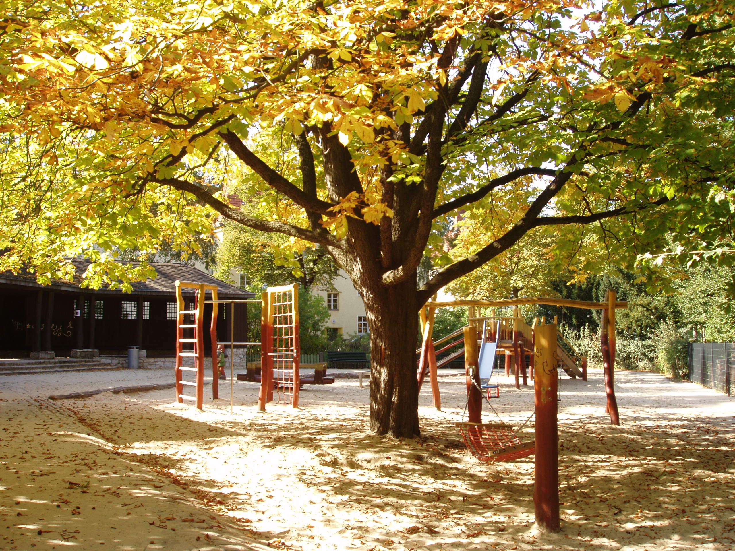 Spielplatz im Brixpark (Brixplatz), Berlin